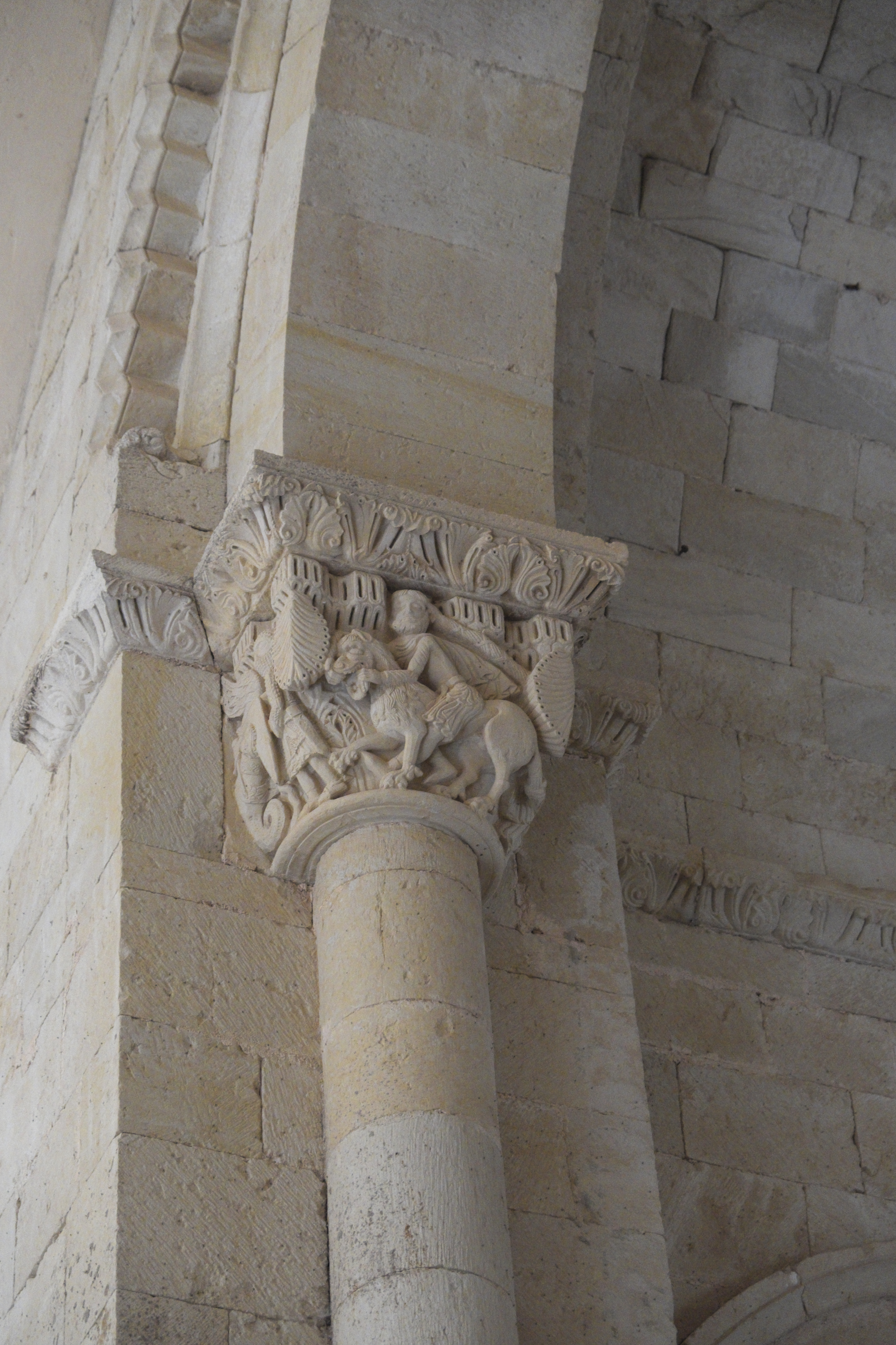 Ermita de Santa Cecilia in Vallespinoso de Aguilar in der Provinz Palencia (Kastilien-León/Spanien), Kapitell im Innenraum, Darstellung: Samsons Kampf mit dem Löwen